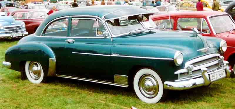 1950 Chevrolet Deluxe Series 2100HK, Sub-Series Styleline, Model 2102 2-Door Sedan 1950